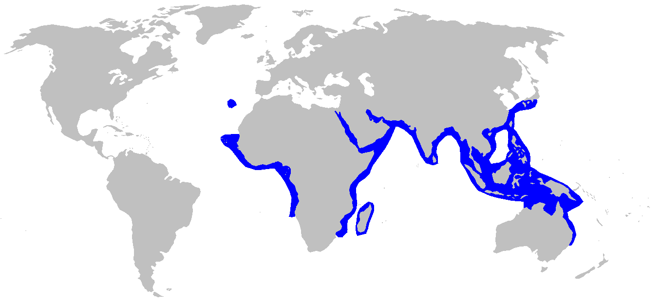 Distribution map for Rhizoprionodon acutus